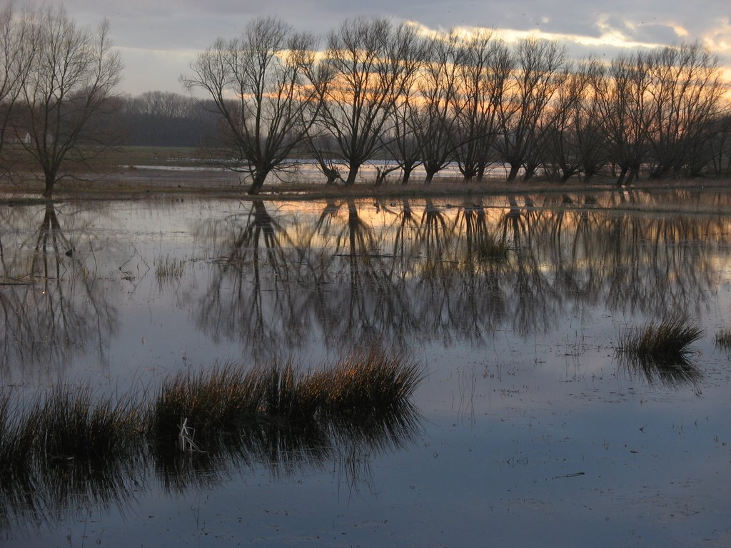 sunset, Bourgoyen, Belgium